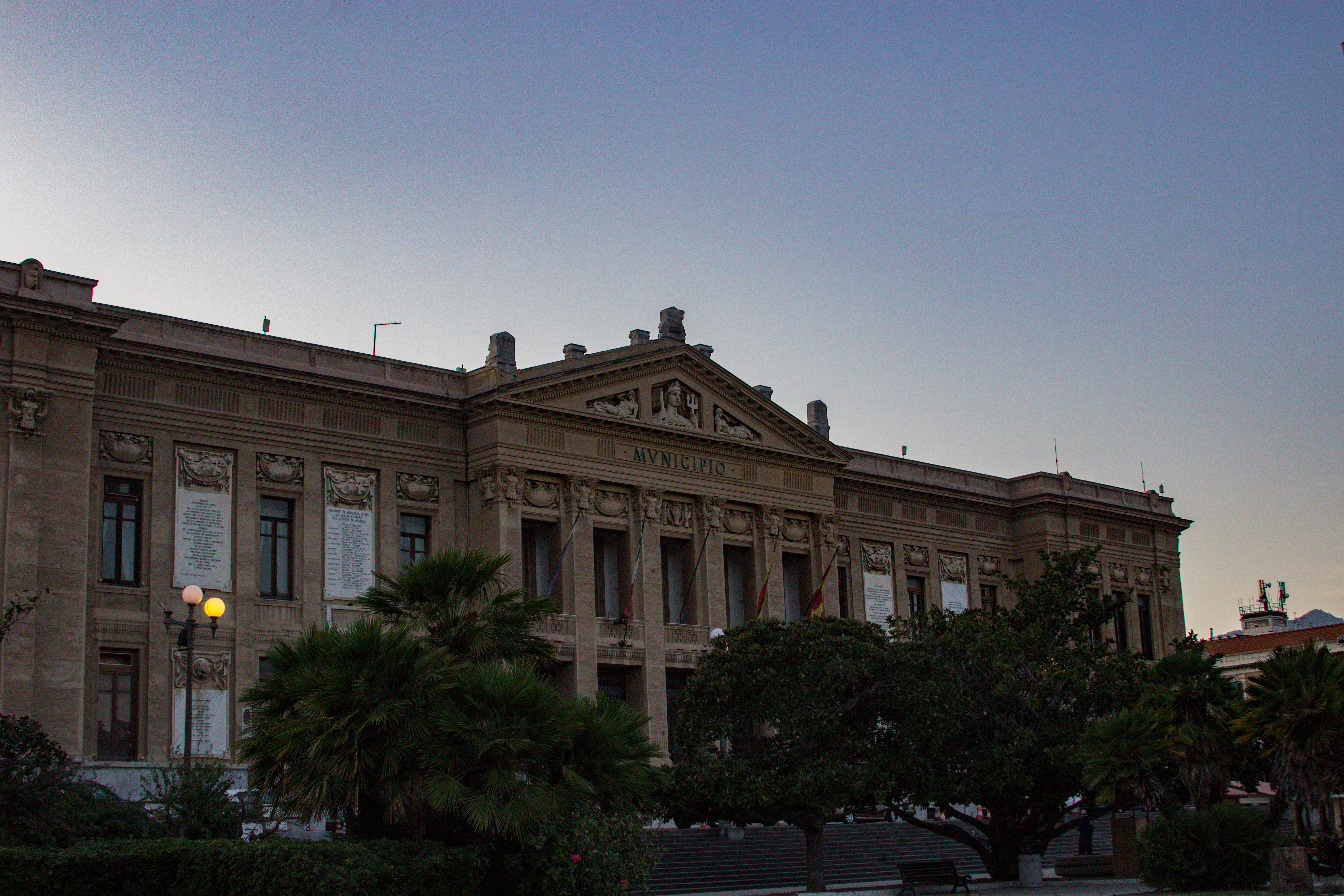 Municipio di Messina